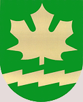 znak obce Halenkov